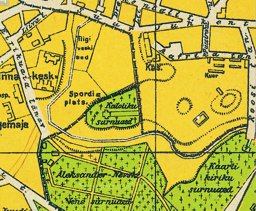 Tiigiveski spordiplats 1928. aasta Tallinna plaanil.